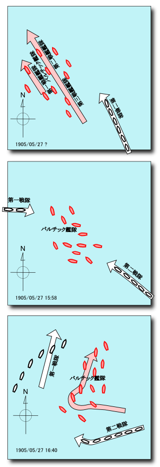 日本海海戦 位置7-9 日本語